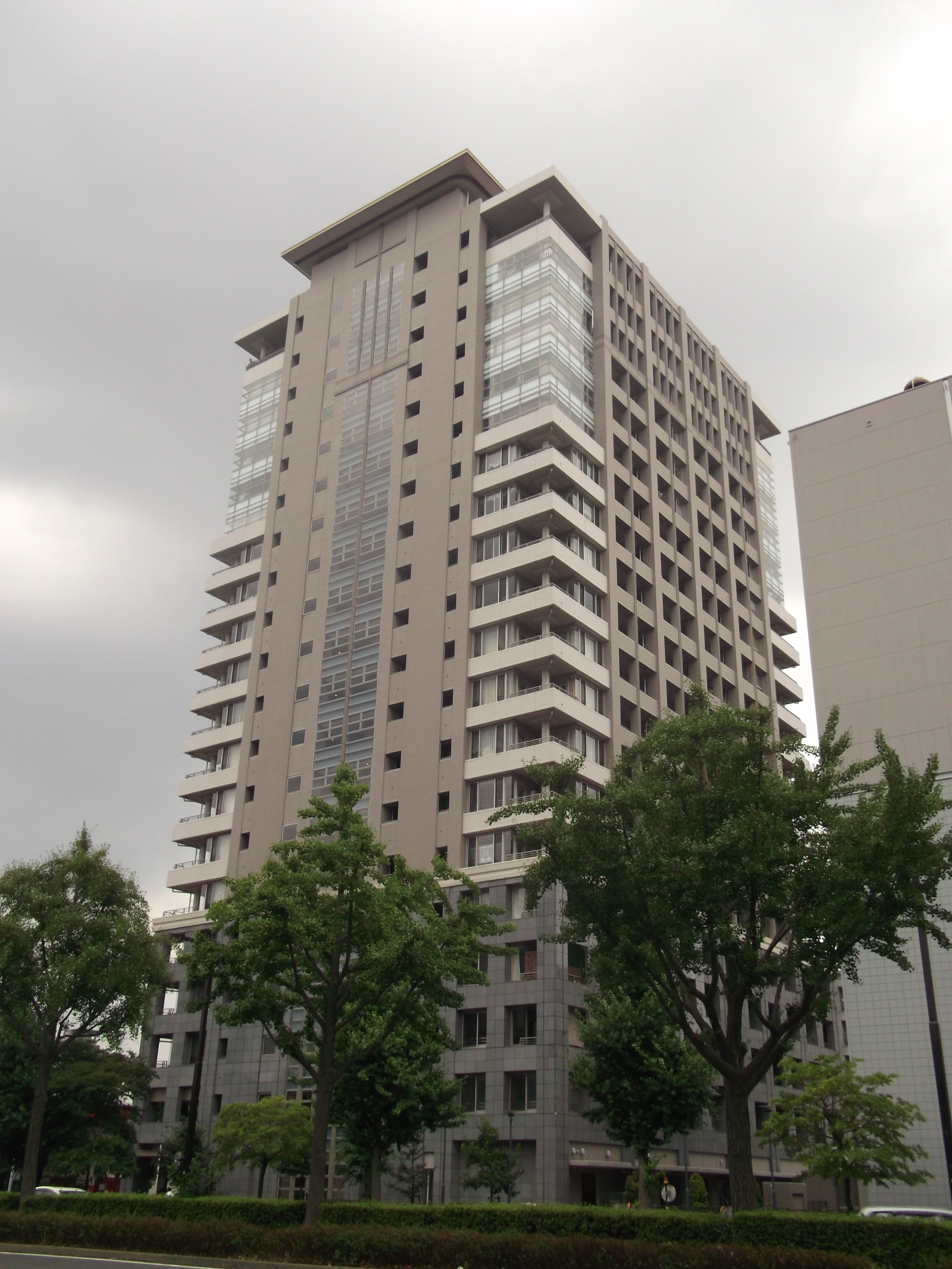 名古屋市東区葵のライオンズタワー葵を北側公道西側より撮影